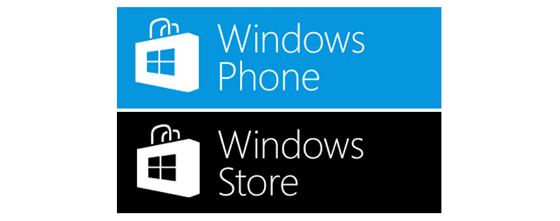 Windows Phone Store foi a versão da Windows Store para Windows Phone